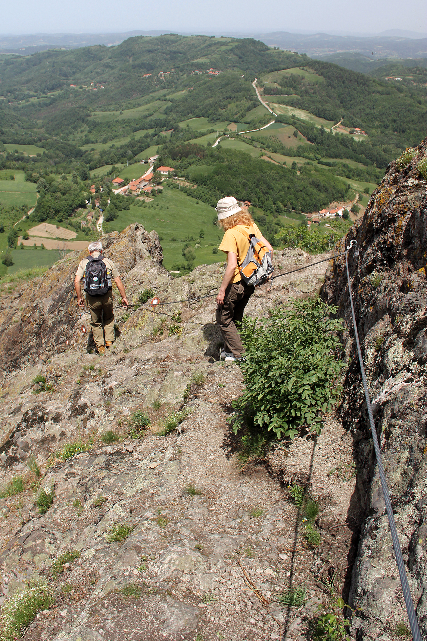 Ово је фотографија заштићеног природног добра у Србији под шифром: СП156 This is a a photo of a natural area in Serbia with ID: СП156 Српски (ћирилица): Природни споменик Островица, Рудник крај Горњег Милановца, Србија